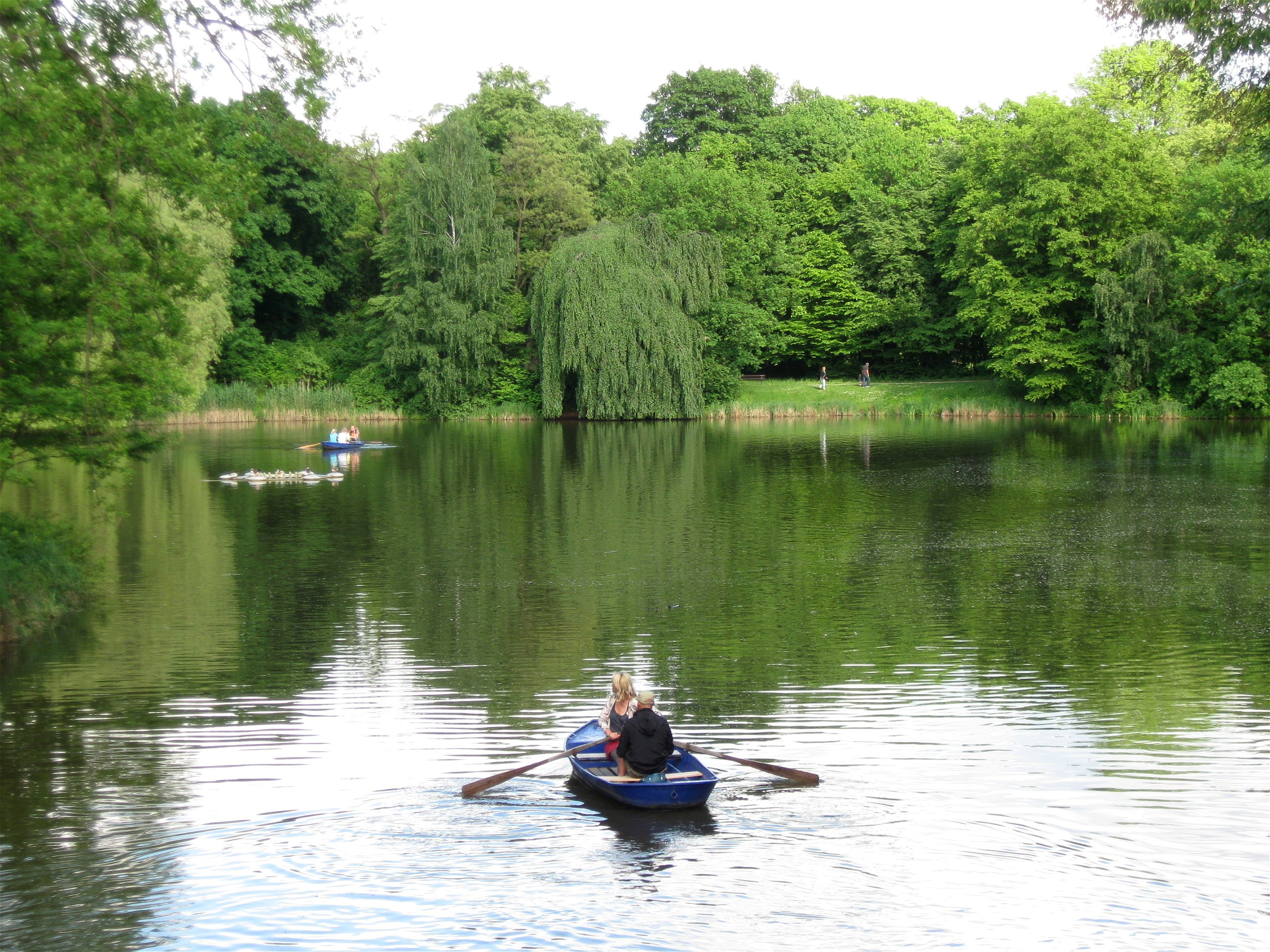 Carolasee, Großer Garten, Dresden